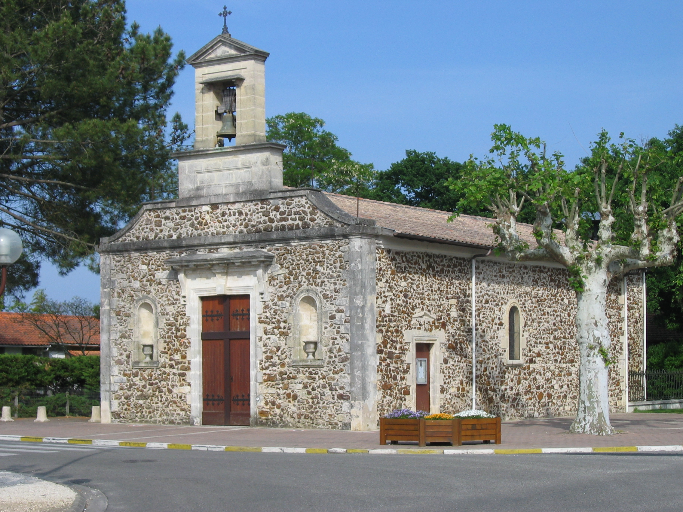 Église de Cazaux, photo personnelle, mai 2006